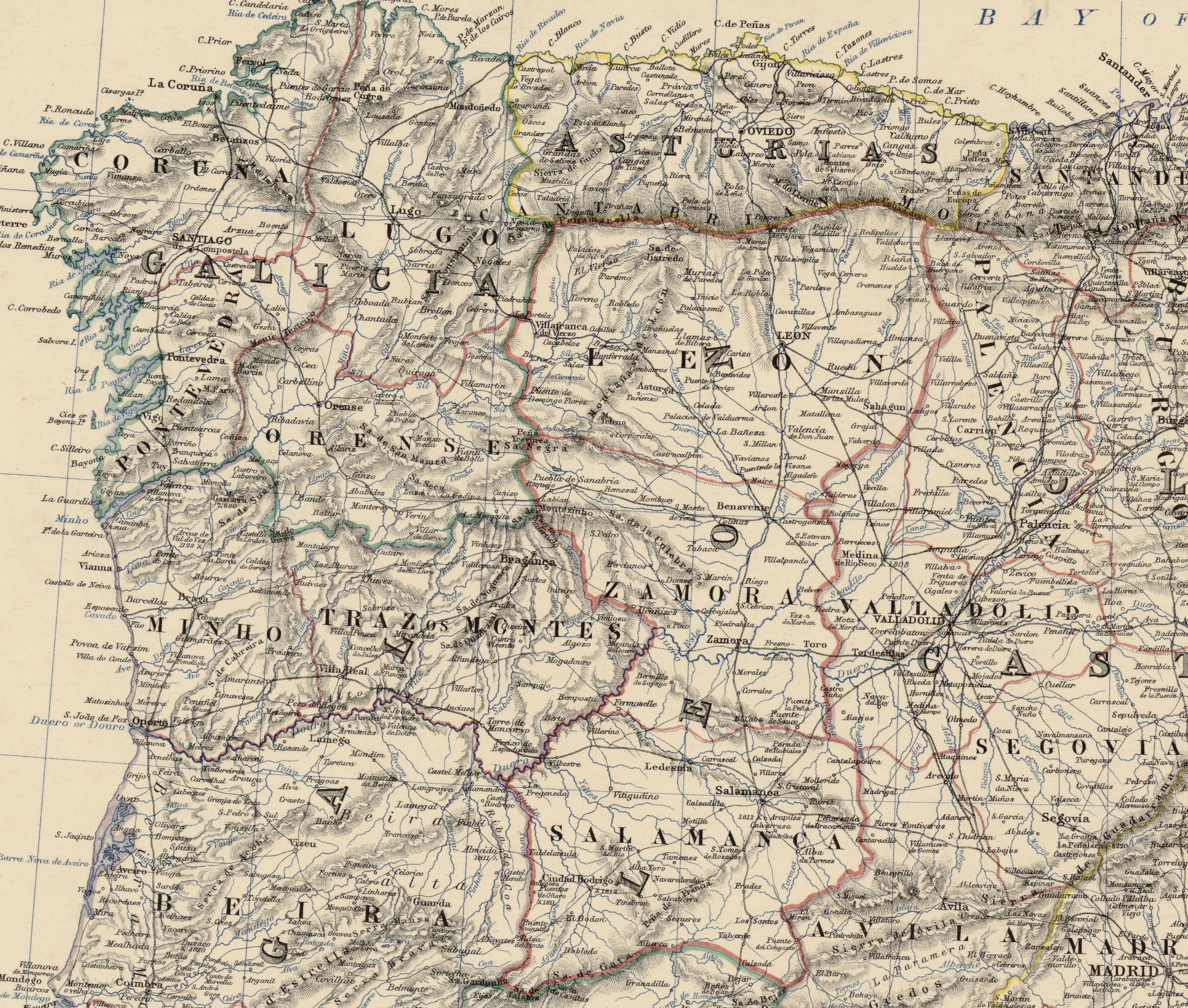 Detalle del noroeste de la Península Ibérica en el mapa "Spain & Portugal", elaborado por Keith Johnston en 1864